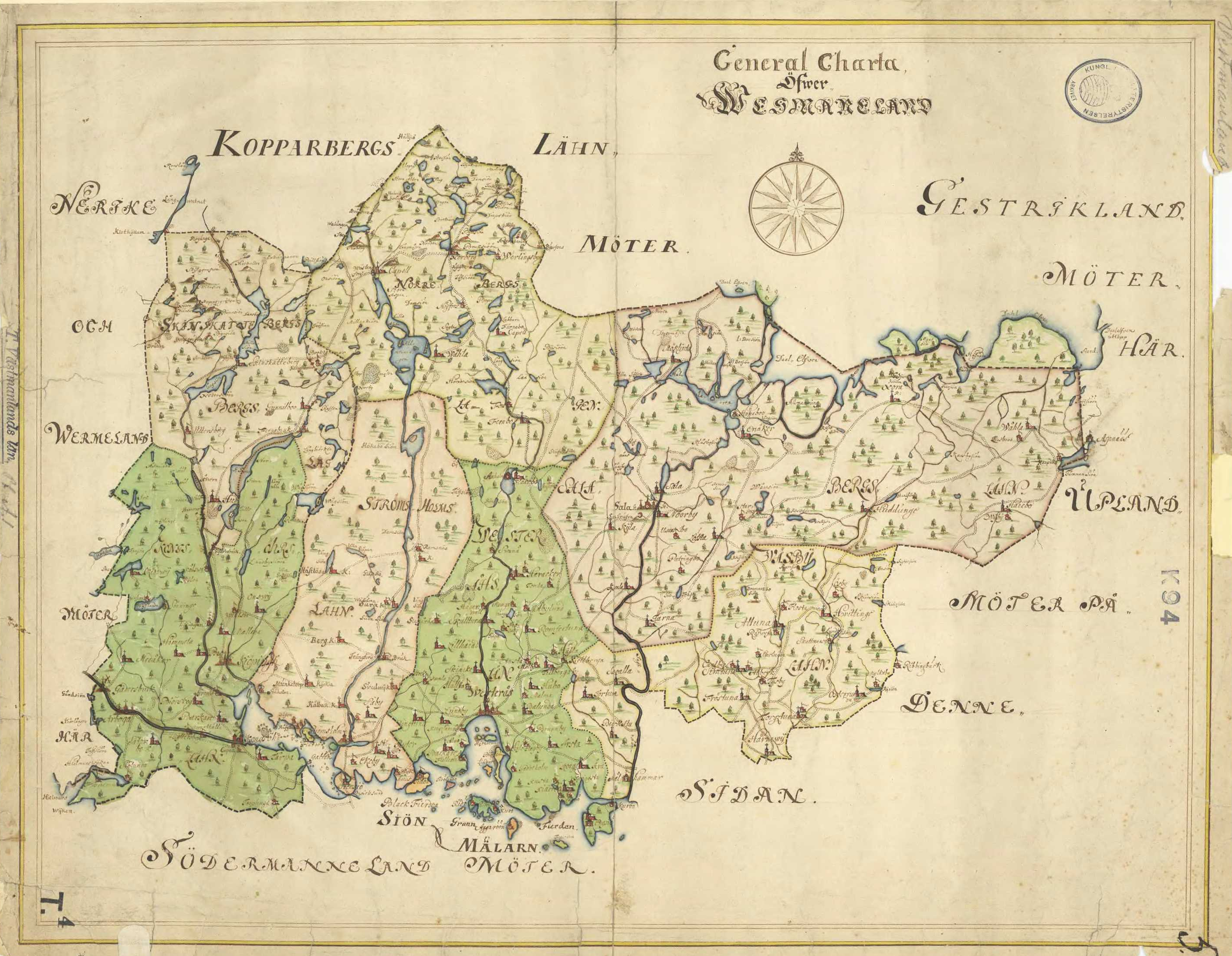 Gammal karta över Västmanland.